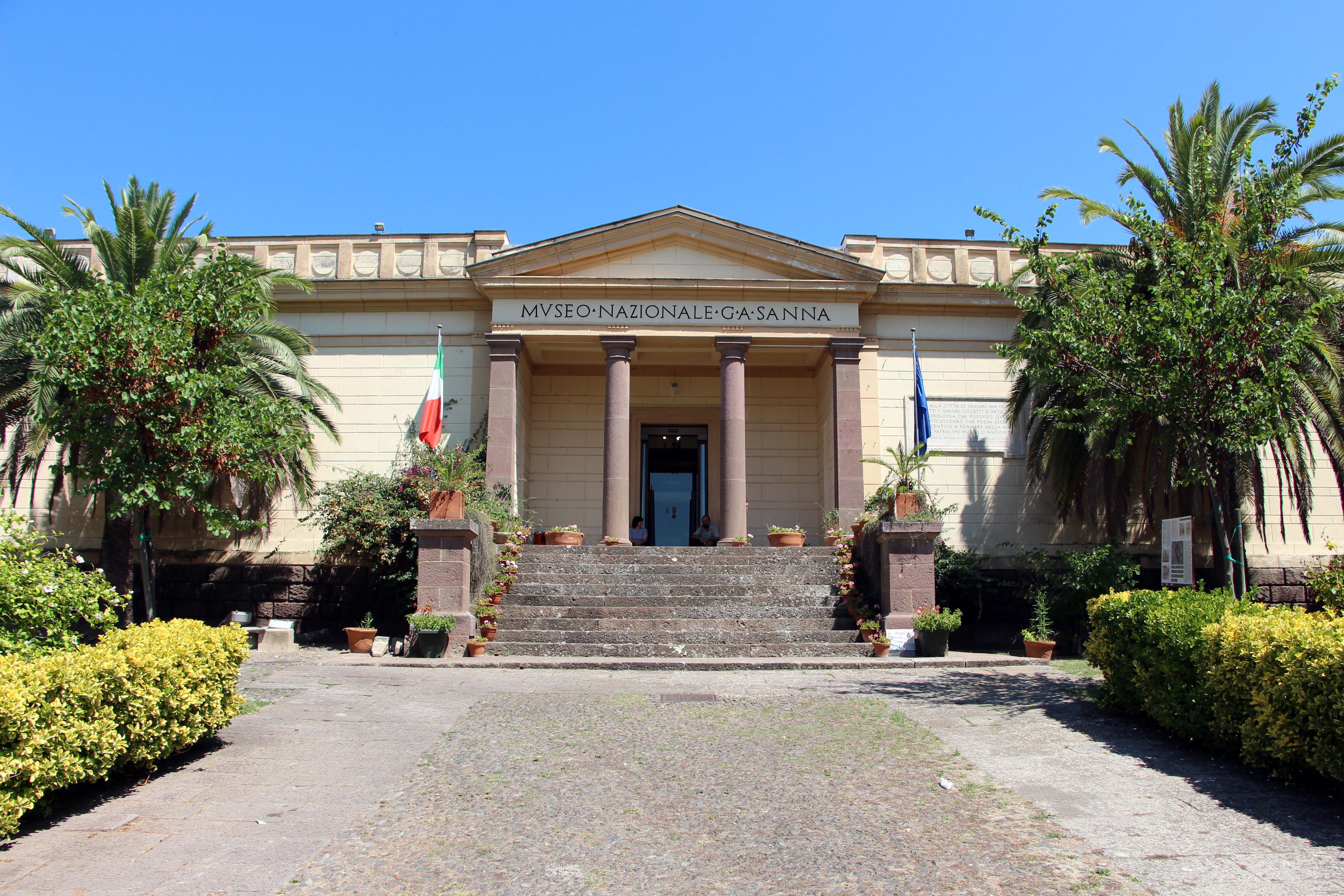 Museo archeologico nazionale G.A. Sanna - MIBAC The making of this document was supported by Wikimedia CH. (Submit your project!) For all the files concerned, please see the category Supported by Wikimedia CH. This is a photo of a monument which is part of cultural heritage of Italy.